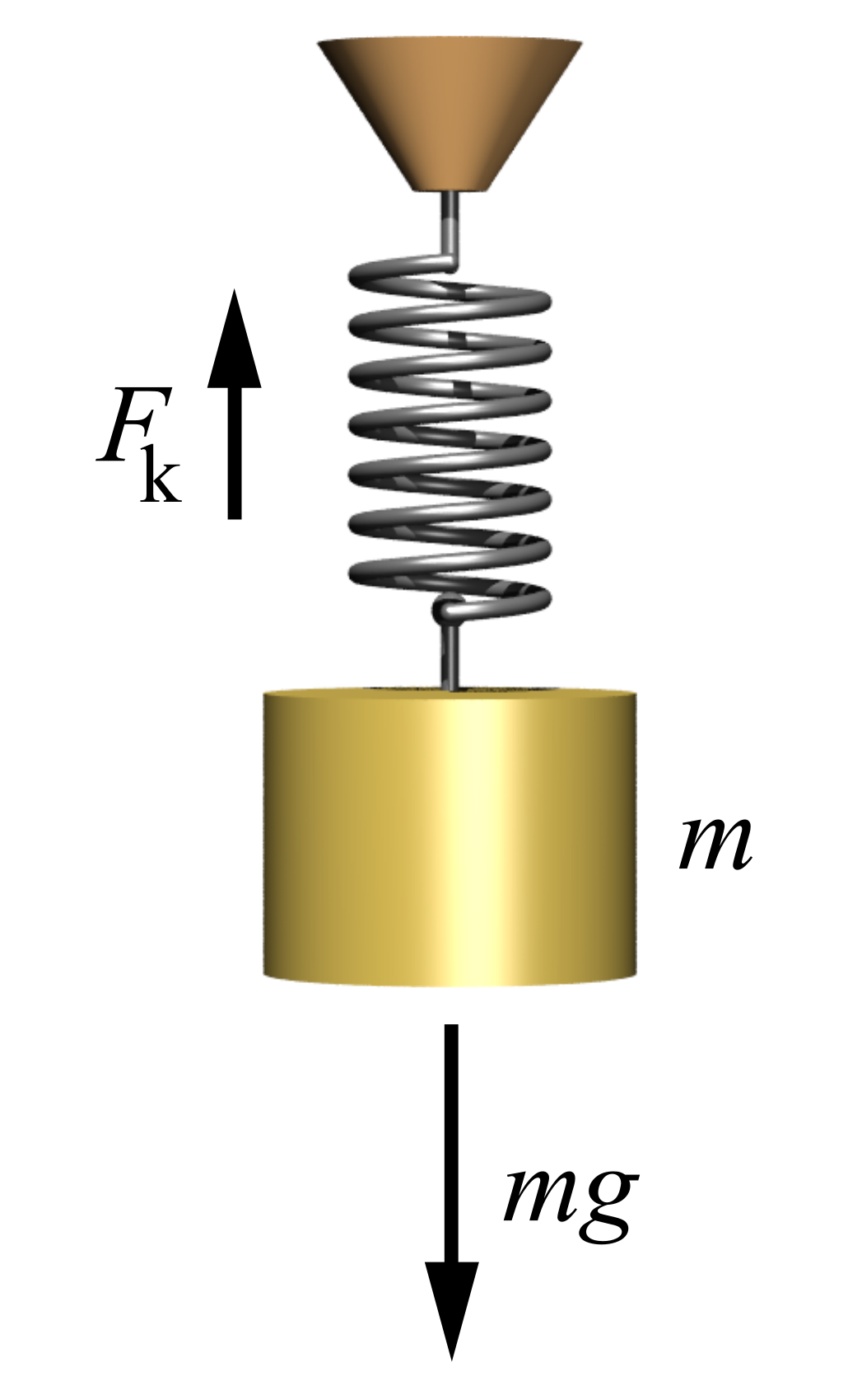 Massa-fjäder system